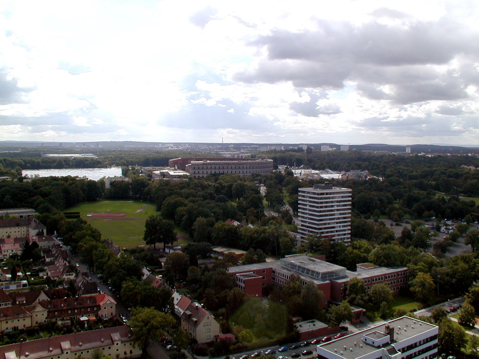 Vorne rechts: Neues Gymnasium Mitte von links nach rechts: Dutzendteich, Kongresshalle und Volksfestplatz Im Hintergrund: Langwasser und der Reichswald